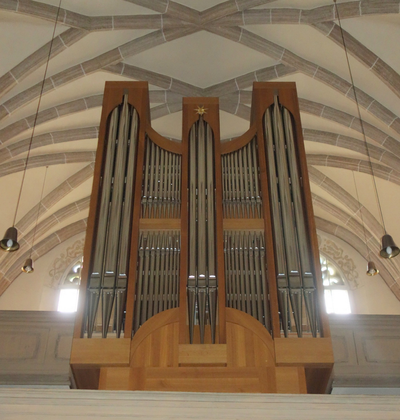 Hauptorgel von St. Mariä Virginis Gunzenhausen, Landkreis Weißenburg-Gunzenhausen, Deutschland